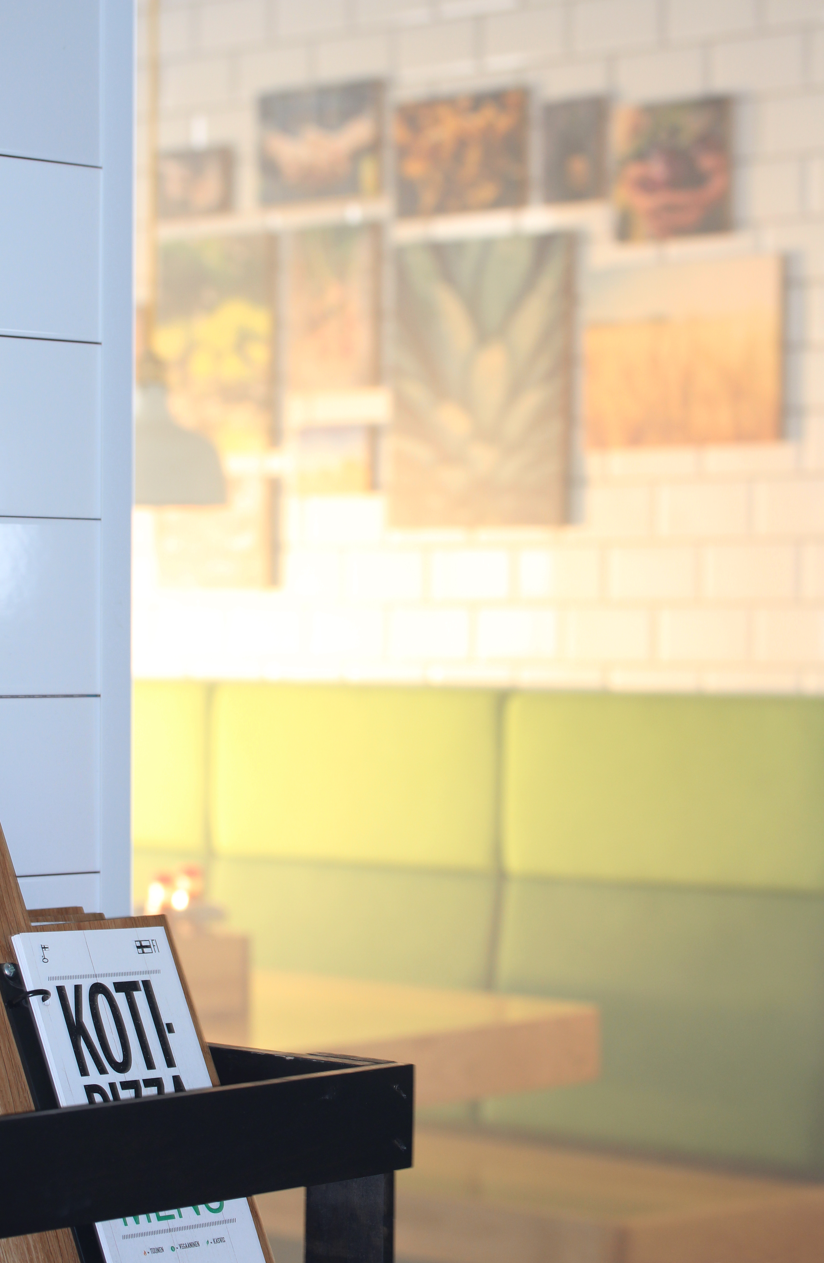 Kotipizzan fast casual -ilme.